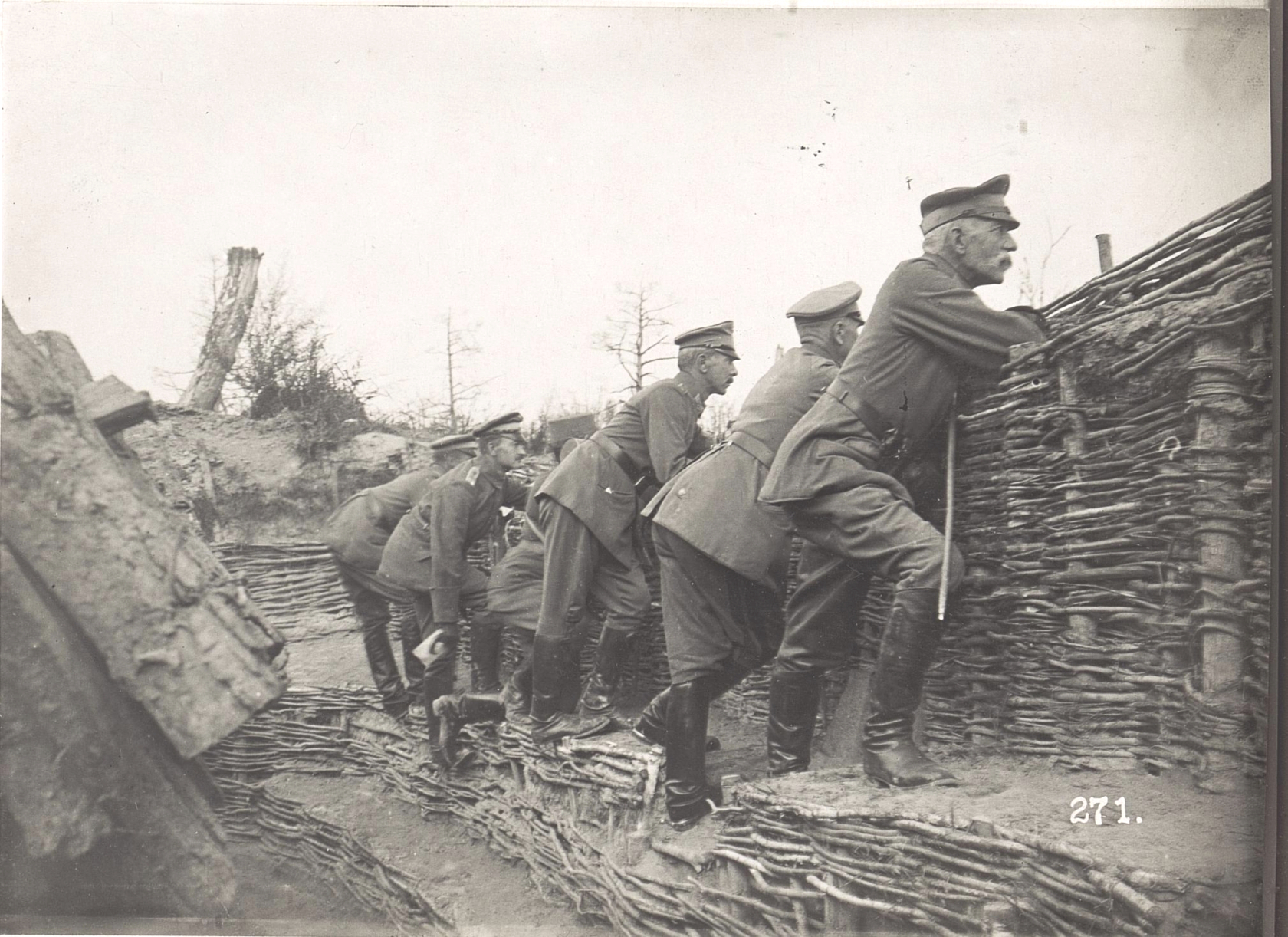 Exzellenz von Stocken (Leopold von Stocken (1862–1926), preußischer Generalleutnant) und Offiziere des Infanterieregiments 377 (Komandeur Oberst z.D. Alfred Müller), 1.Bataillon A-Linie